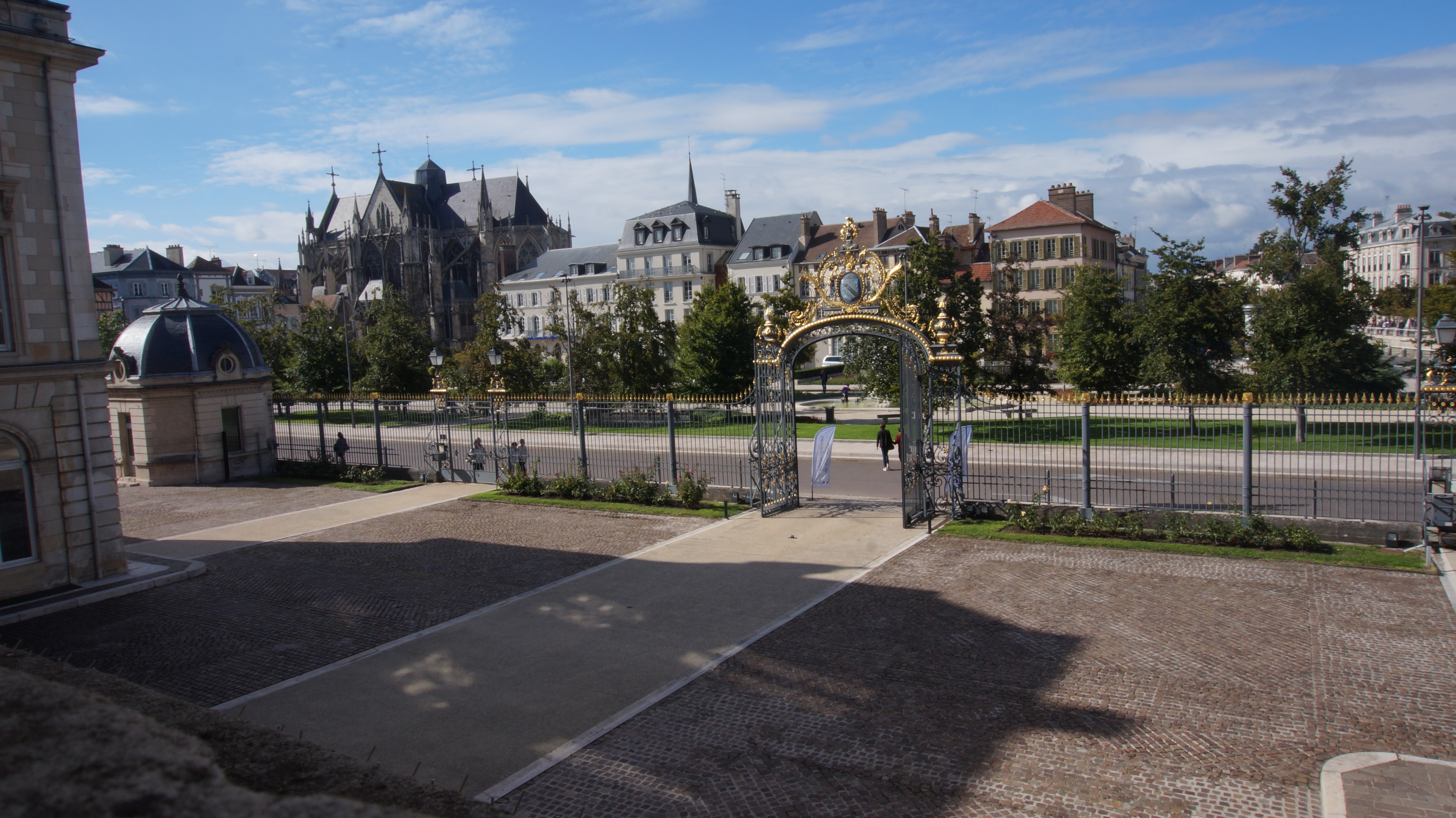 La place de la Libération vue depuis l'hôtel de préfecture de l'Aube, à Troyes.